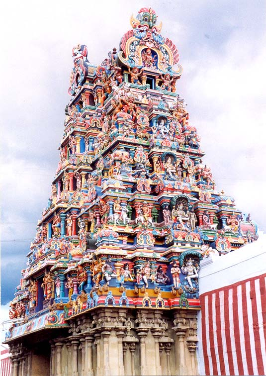 Summary un gopuram du temple de Mînâkshî à Madurai Source Nataraja-Shiva Statut 1997, Gérald Anfossi catégorie:images de l'Inde